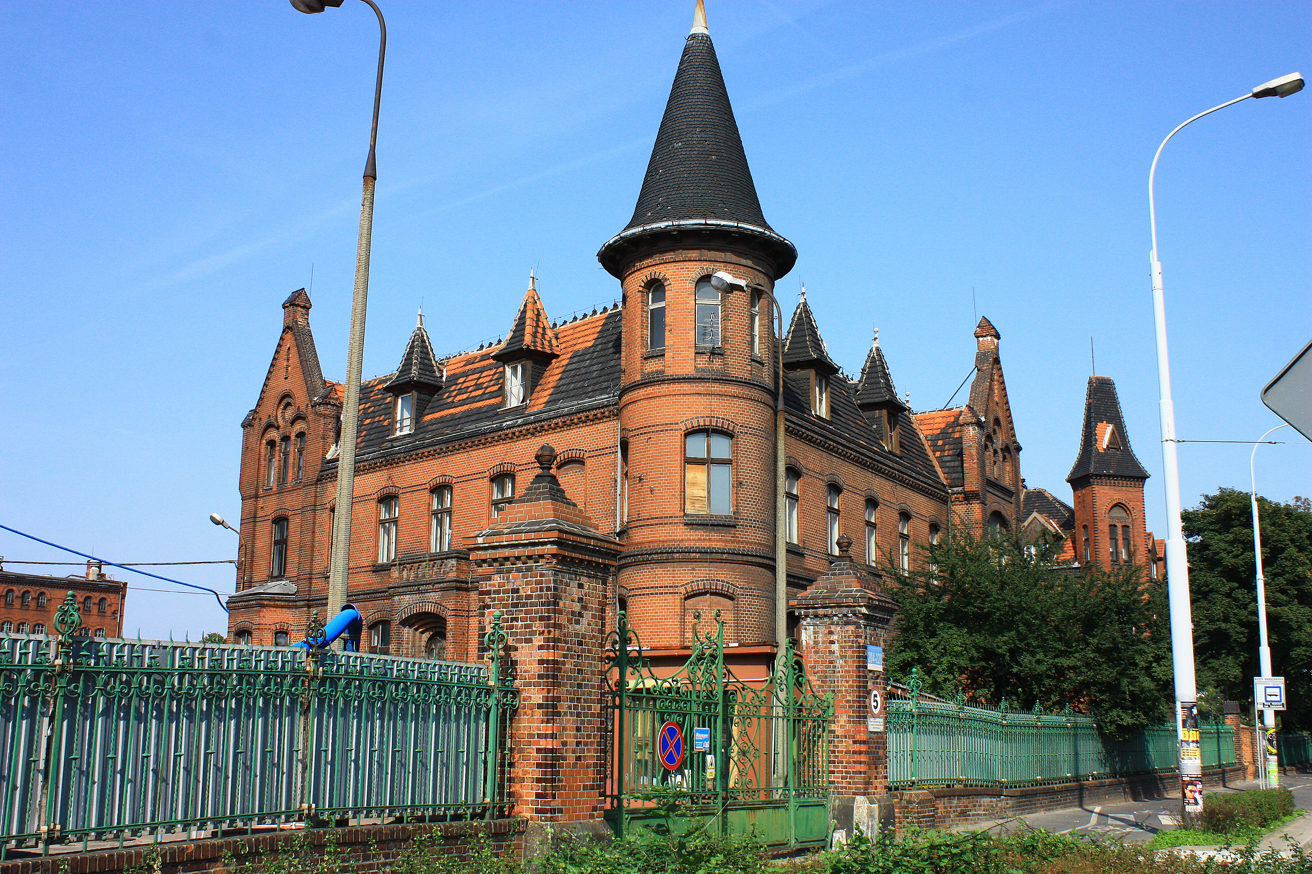 Wrocław, budynek zarządu, 1891-1894